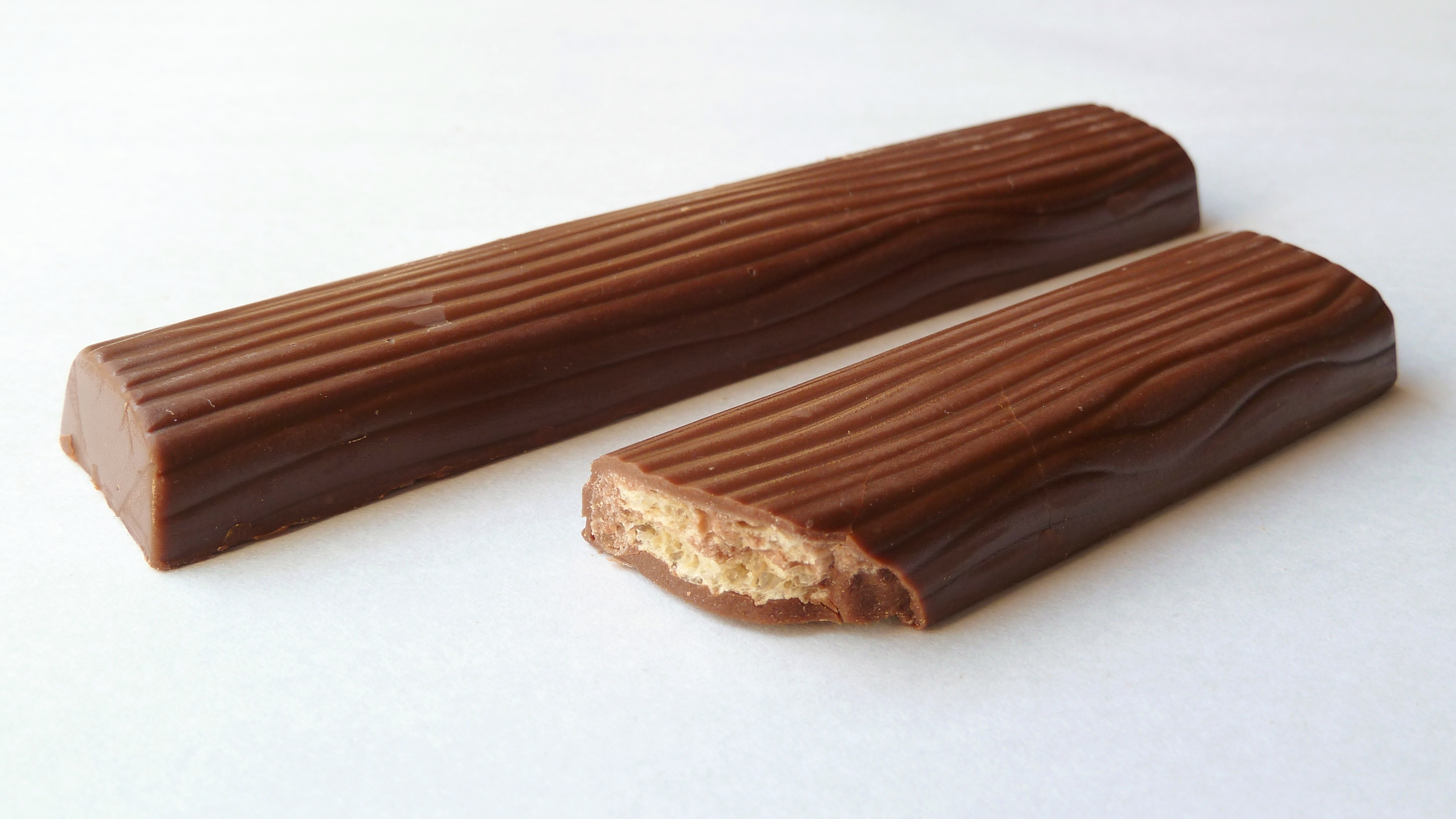 フルタ製菓が販売するチョコレート菓子「セコイヤチョコレート」のミルク味